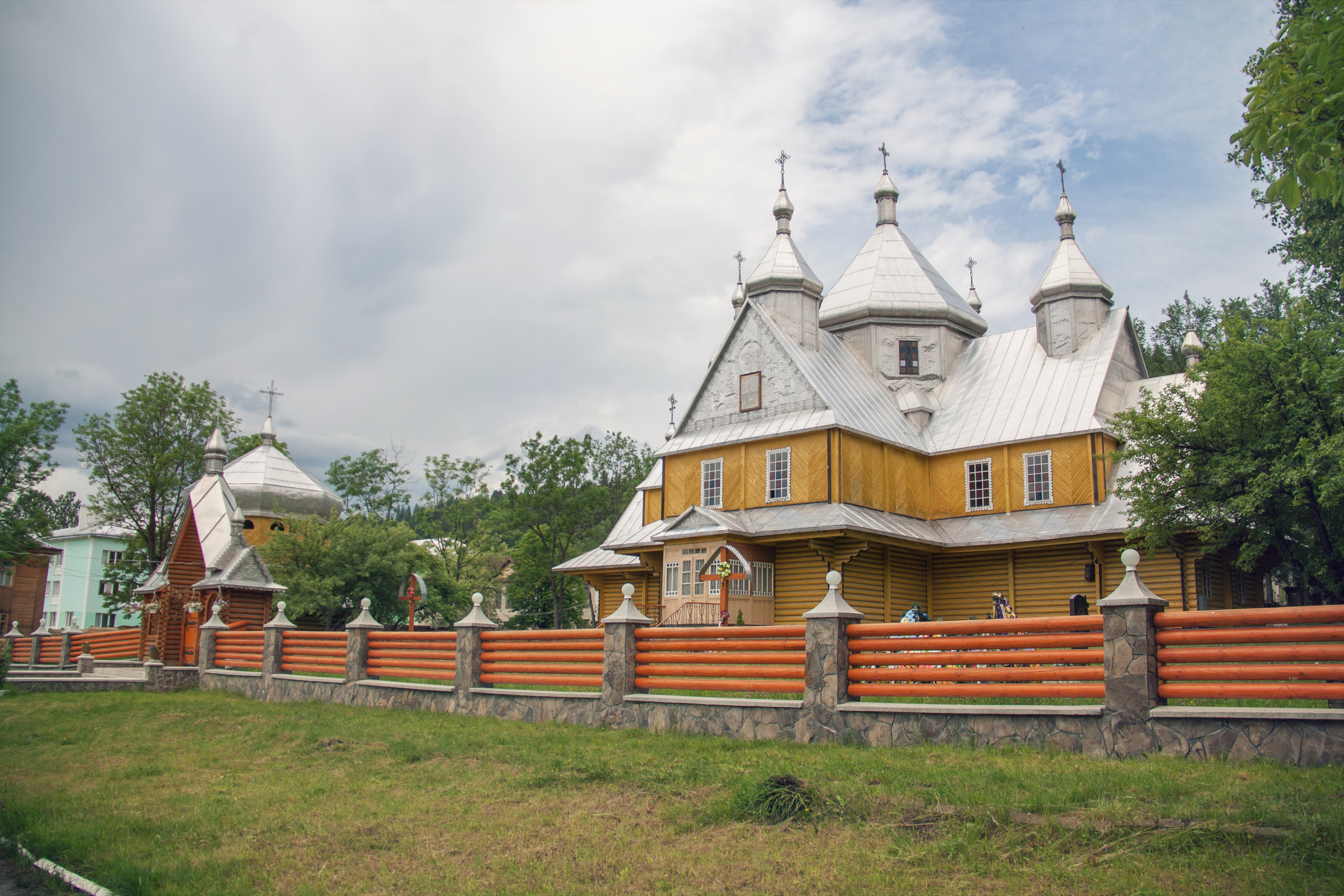 Verkhovyna, Ucrania